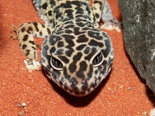 Leopardgecko (Eublepharis macularius) Beschreibung: Leopardgecko Quelle: fotografiert am 15.08.2004 Fotograf oder Zeichner: Joscha Arenz Lizenzstatus: GNU FDL